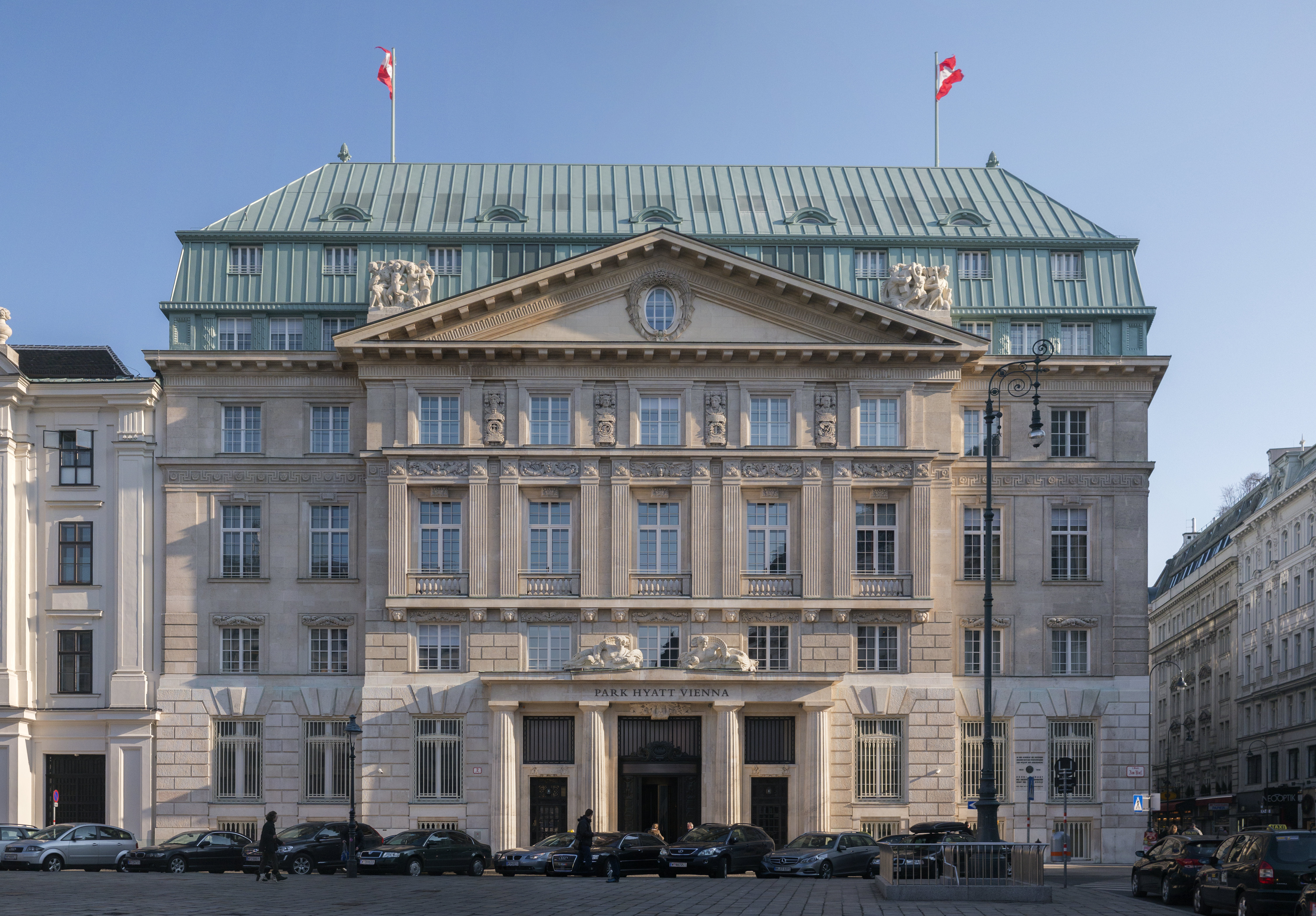 Ehem. Länderbank, urspr. nö. Escompte-Gesellschaft